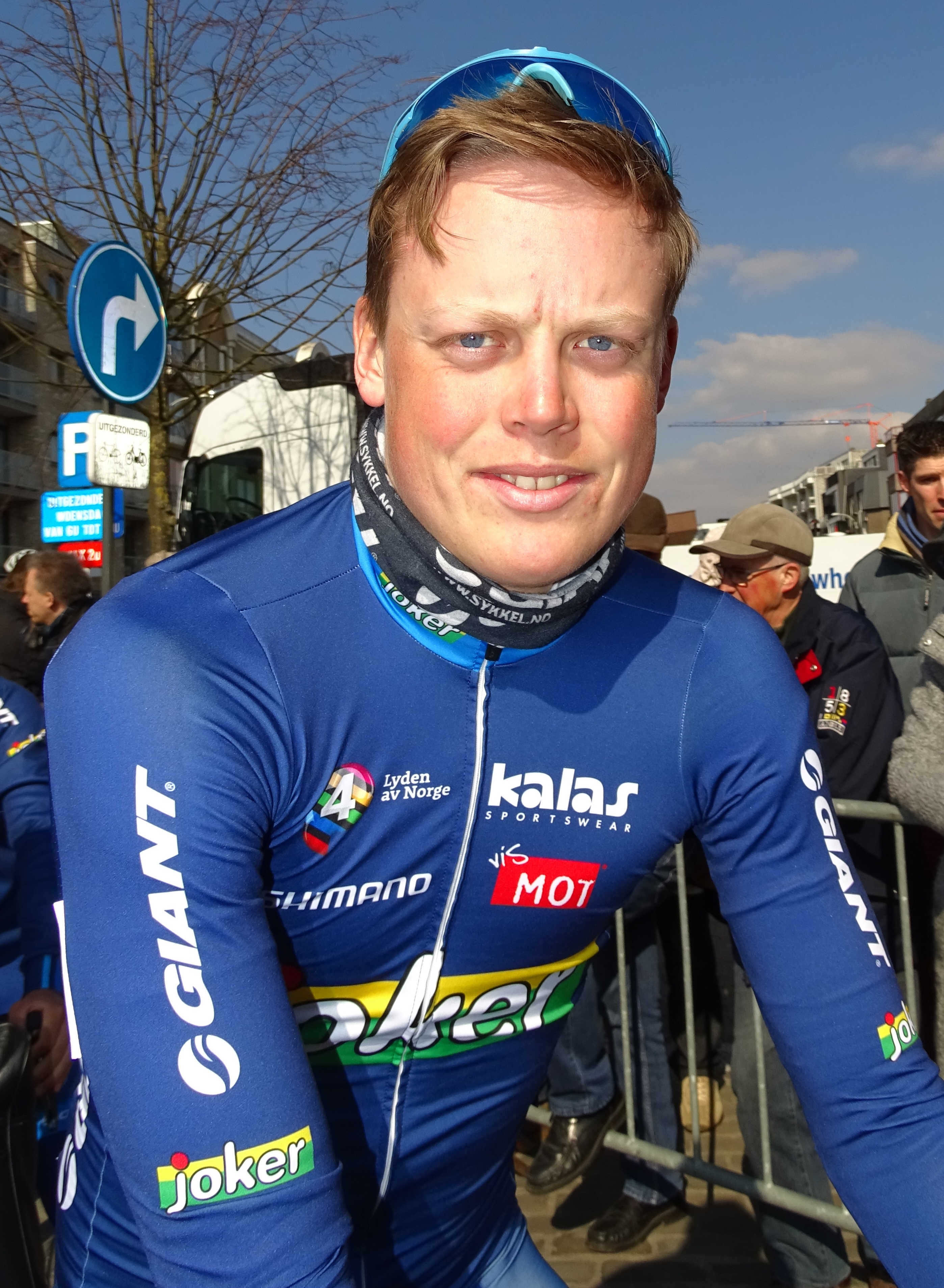 Reportage réalisé le mercredi 16 mars à l'occasion du départ de la Nokere Koerse 2016 à Deinze, Belgique.